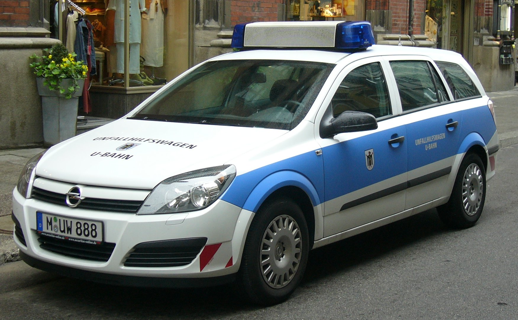 Unfallhilfswagen der U-Bahnwache München